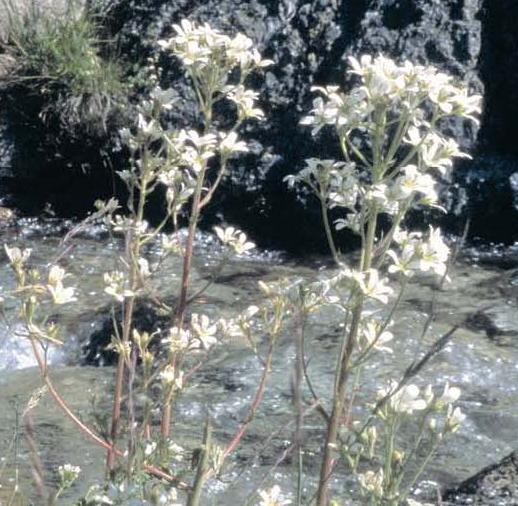 Detail de l'image Saxifraga aquatica (Ruisseau près du Tourmalet)